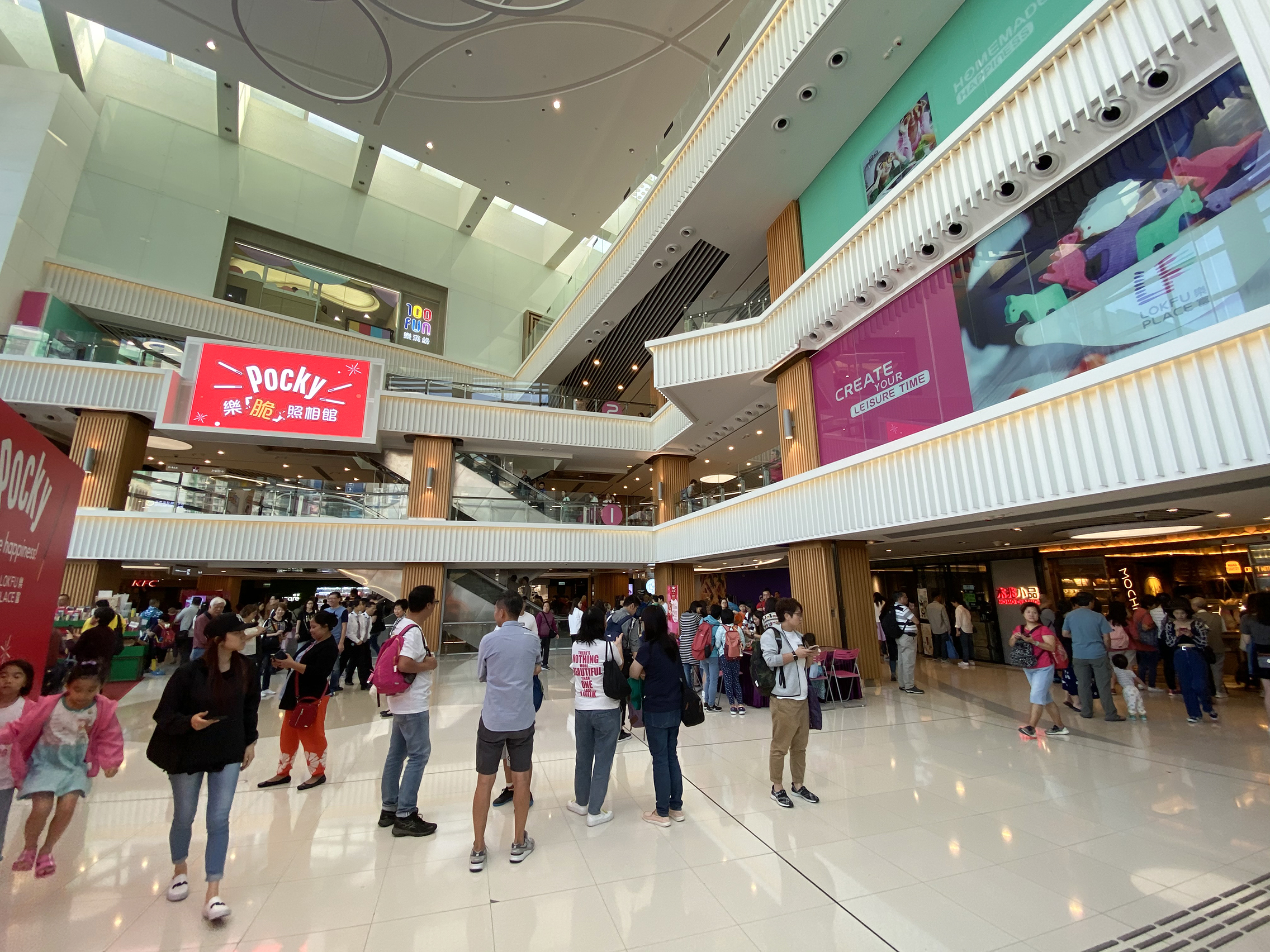 Lok Fu Place Zone B Atrium